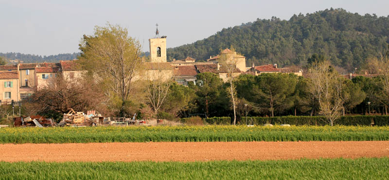 Village of La Bastide de Jourdan in Vaucluse, France